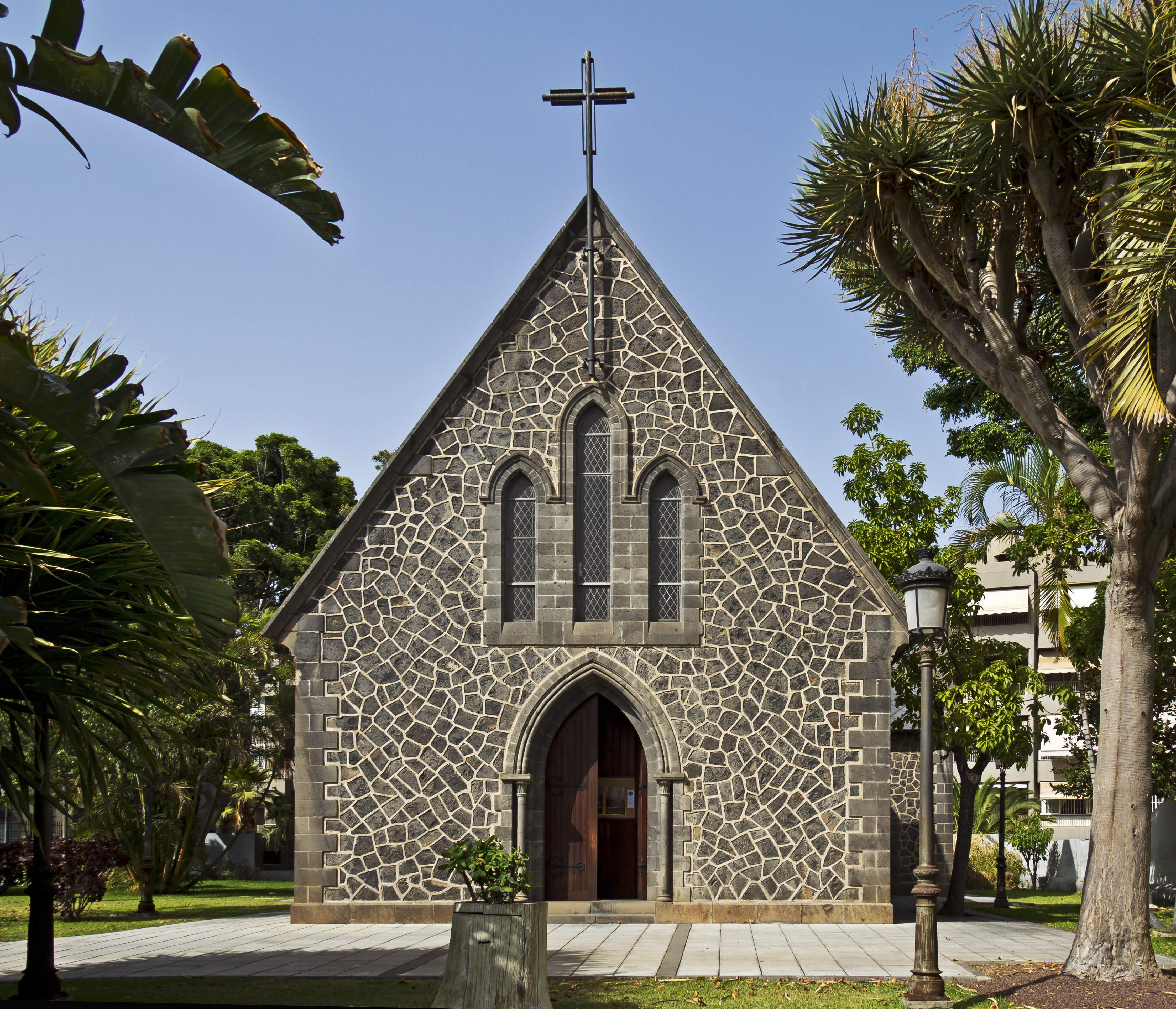 Die alte Anglikanische Kirche Saint George (San Jorge) wurde 1897 von dem Architekten Walter I. Wood entworfen. Sie befindet sich an der Plaza del 25 de Julio in Santa Cruz de Tenerife.